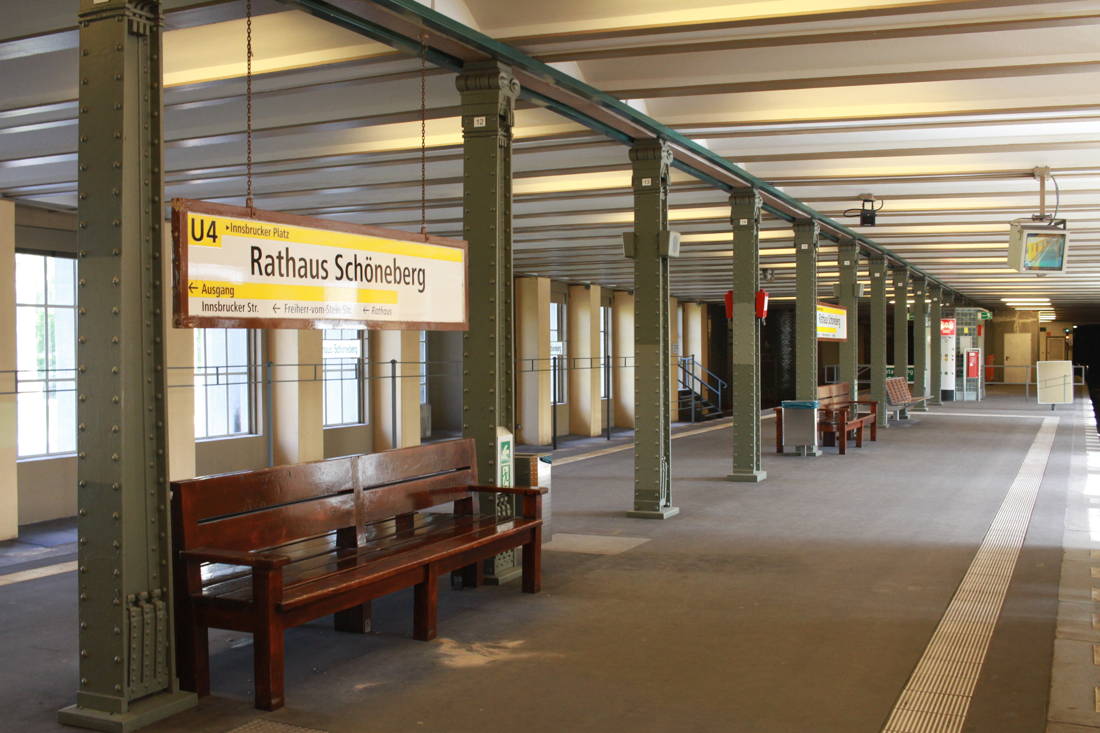 Asema kyltteineen.